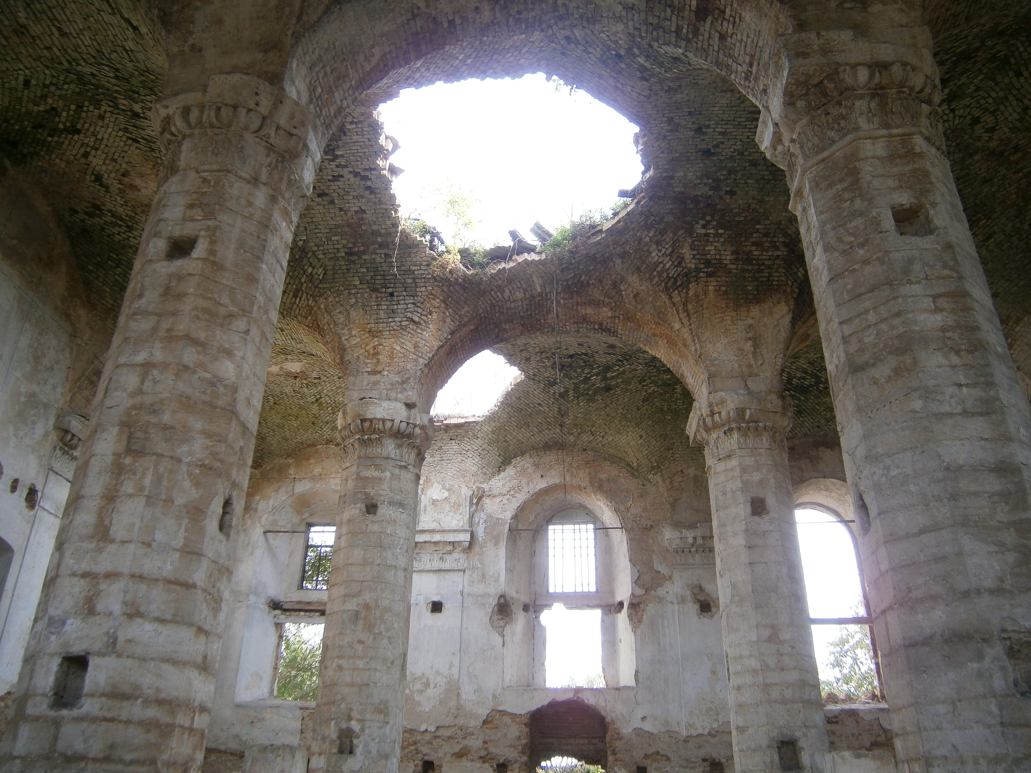 Синагога (мур.), Острог, вул.Лесі Українки